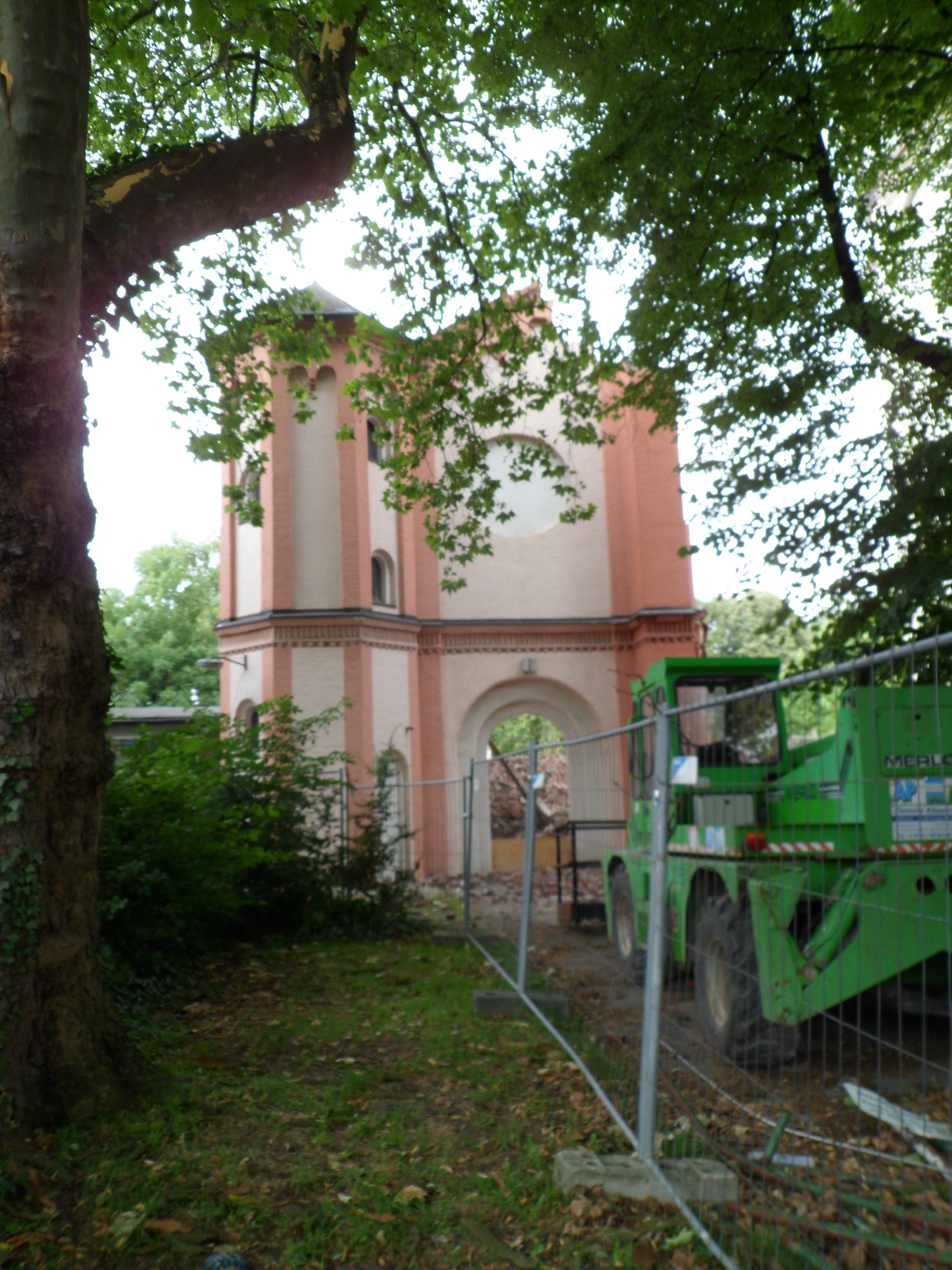 Letzte Reste des Redemptoristenklosters Bochum vor seinem Abriss